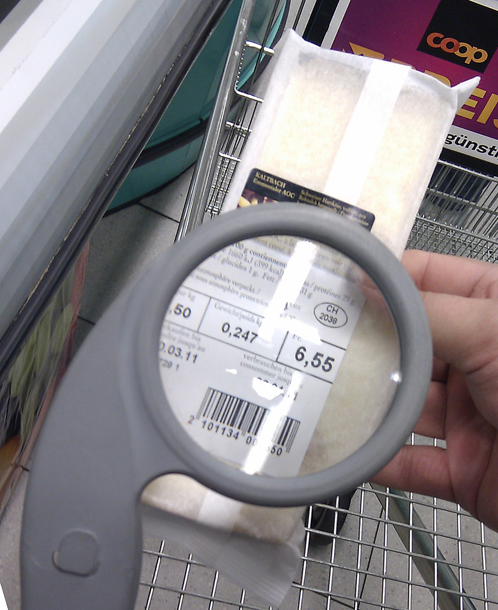 Einkaufswagen mit integrierter Lupe, Coop-Supermarkt in der Schweiz